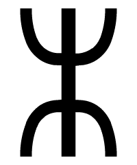 Tvimadur, Runic calendar rune number 18